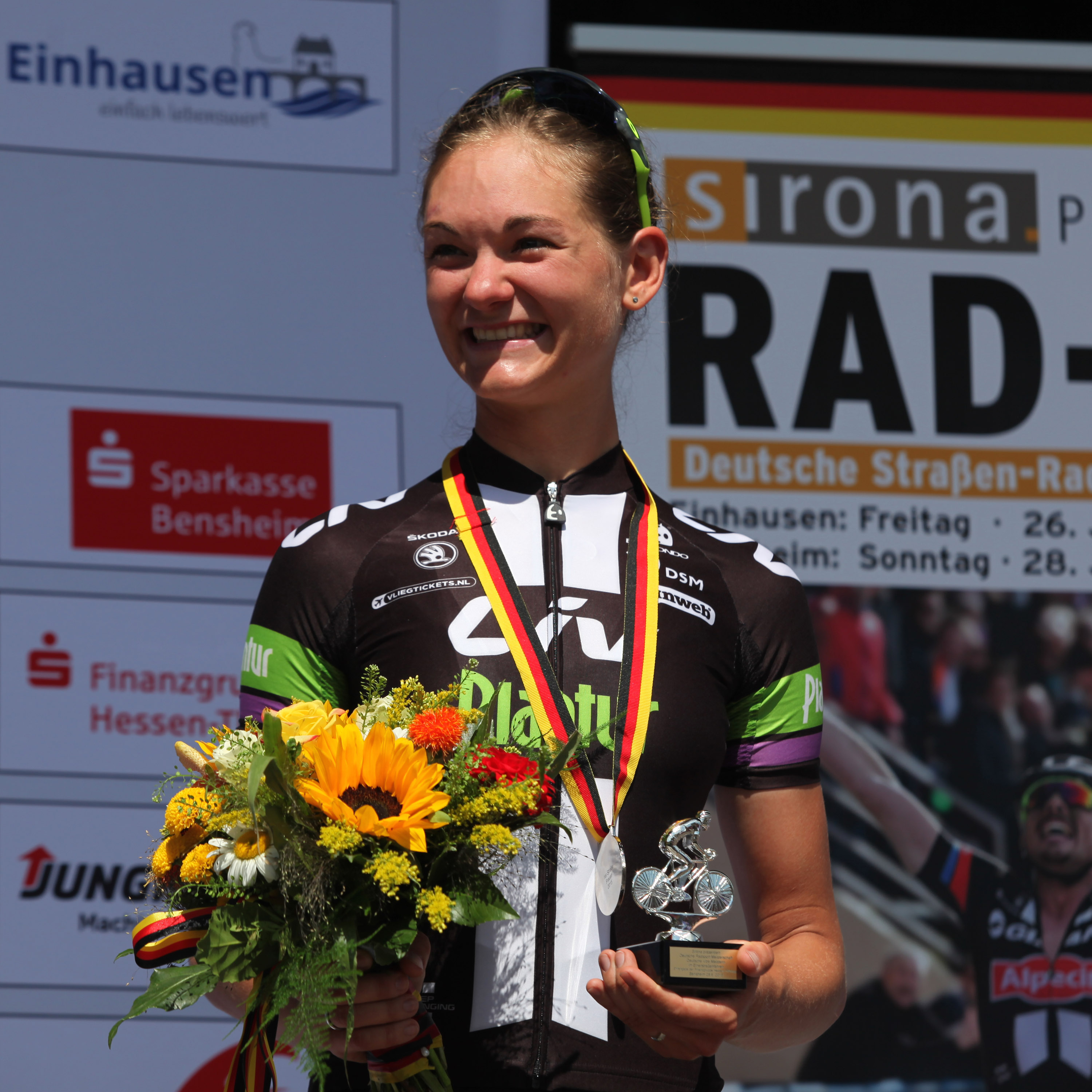 Claudia Lichtenberg bei der Siegerehrung. Foto von den Deutschen Meisterschaften im Straßenrennen der Männer (Elite) am 28. Juni 2015 in Bensheim (Hessen)